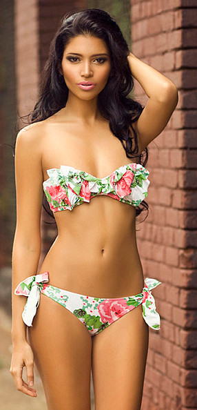 Bandeau Bikini